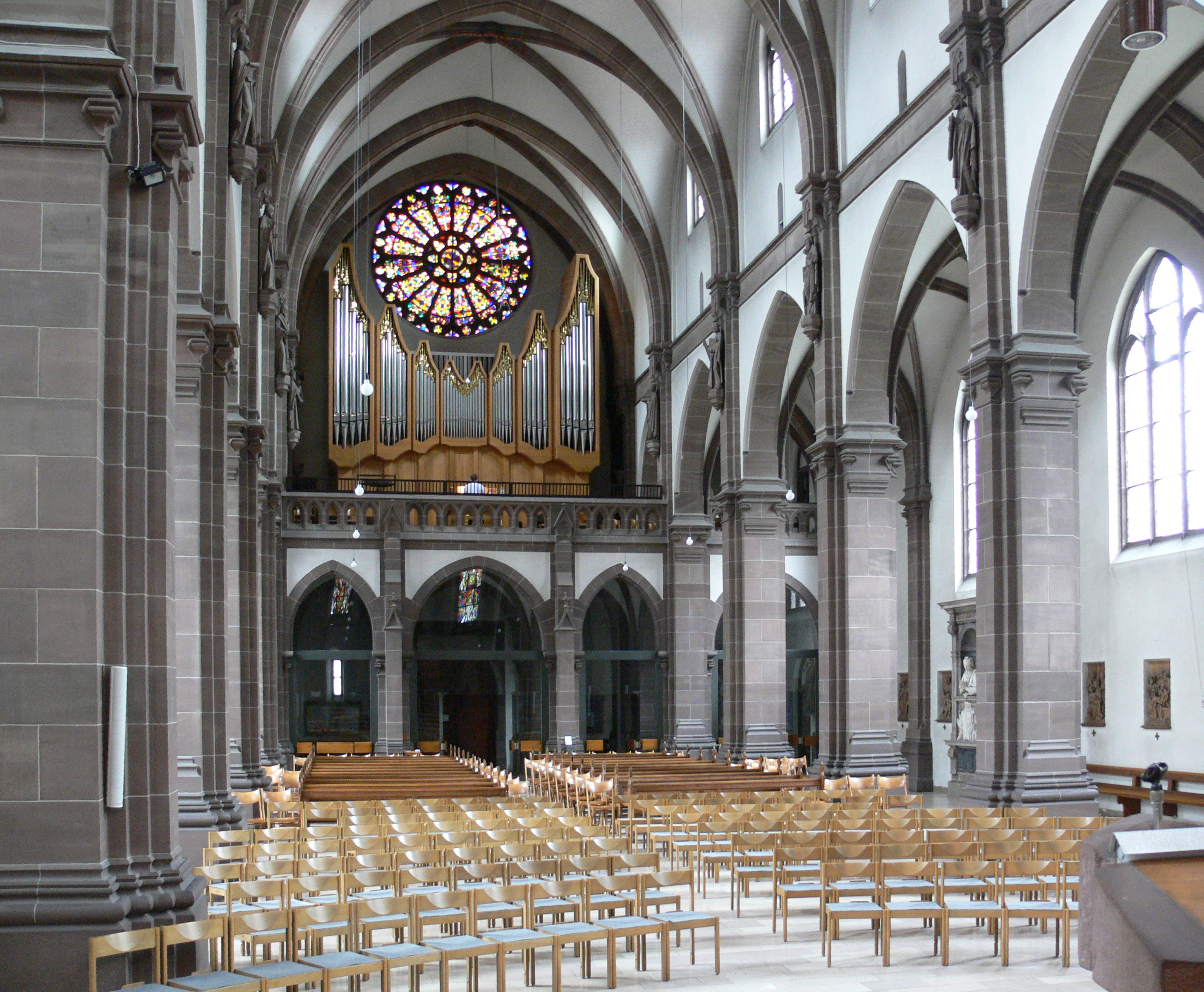 Heilig-Geist-Kirche (Kath. Pfarrkirche Hl. Geist), Schwetzingerstadt, Mannheim Innenansicht, Blick zur Orgelempore